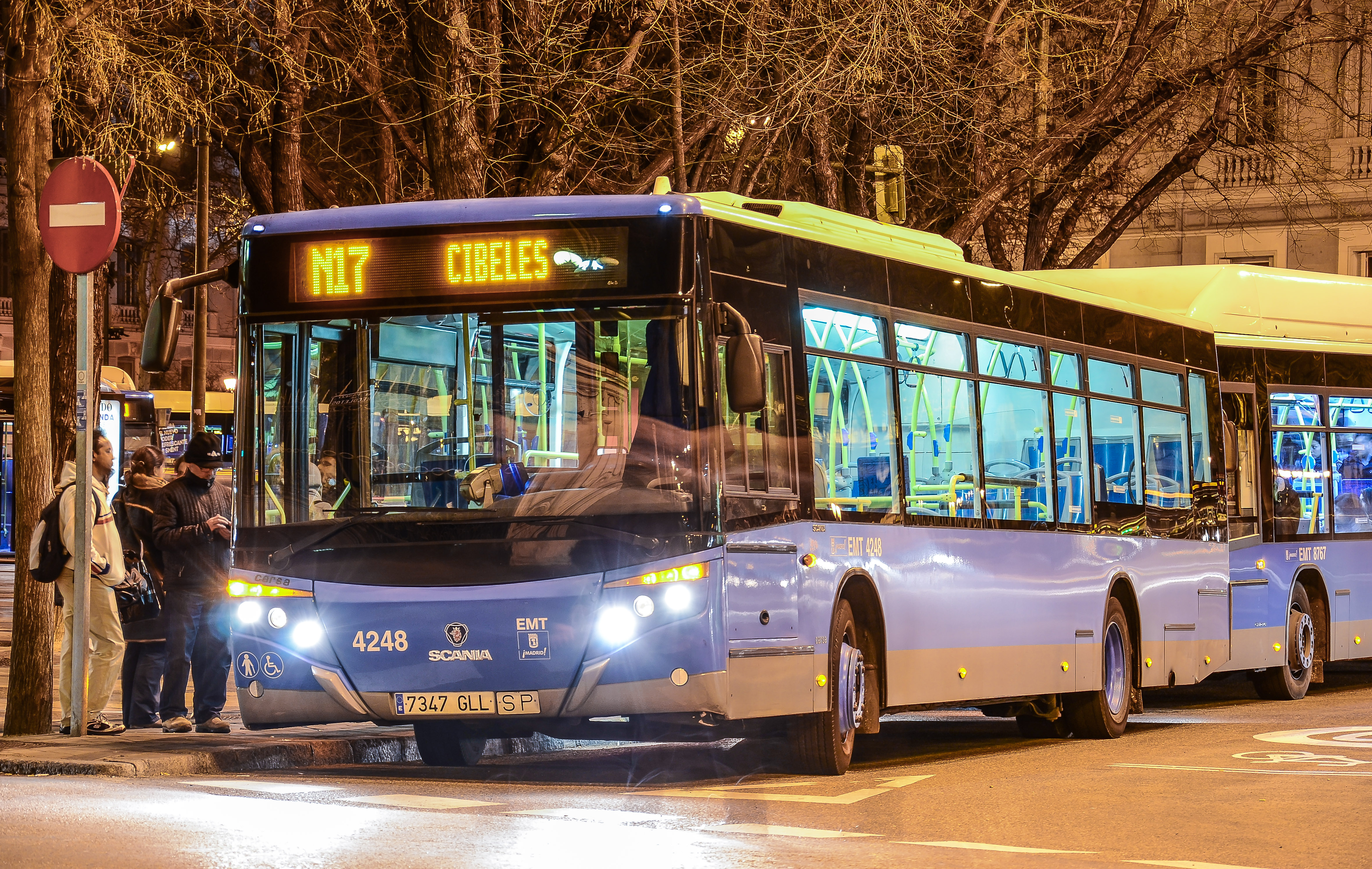 Con motivo de la celebración de la Semana Santa, la Empresa Municipal de Transportes de Madrid suprime, hasta 17 de abril, el servicio de autobuses universitarios, coincidiendo con este periodo no lectivo de las universidades madrileñas.